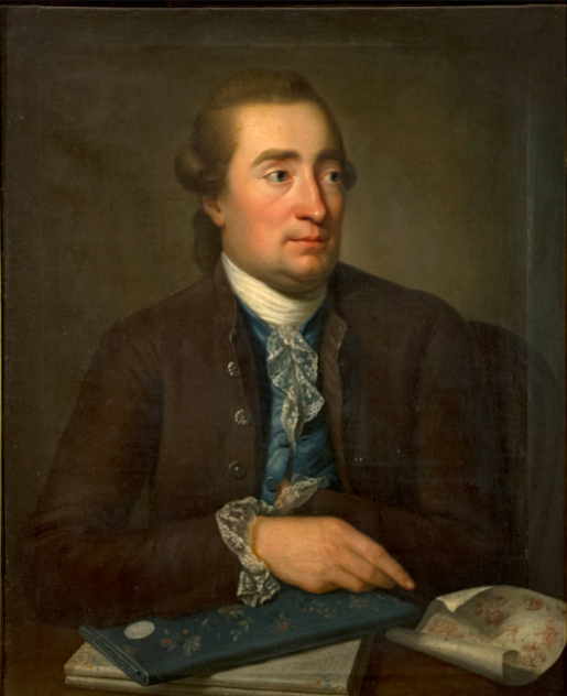 Henri DuPasquier.